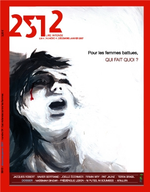 Couverture du numéro quatre du magazine 2512.